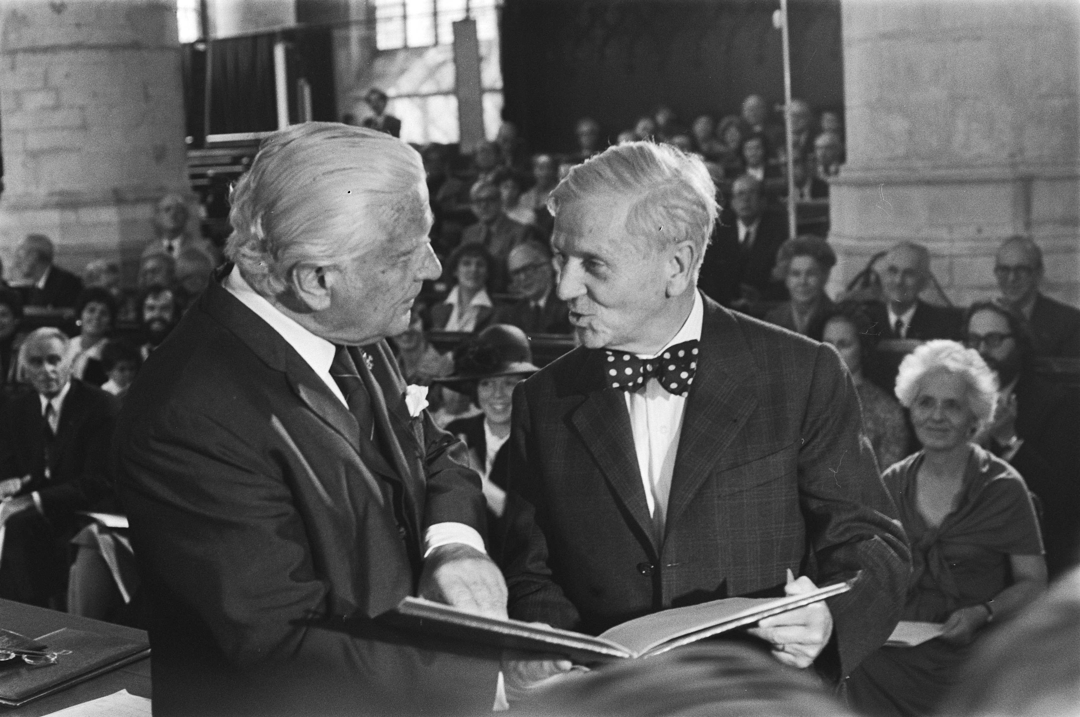 Erasmusprijsuitreiking in Pieterskerk Leiden, voorzitter G. van der Wal (Permium Erasmianum) en professor René David. Datum 17 september 1976